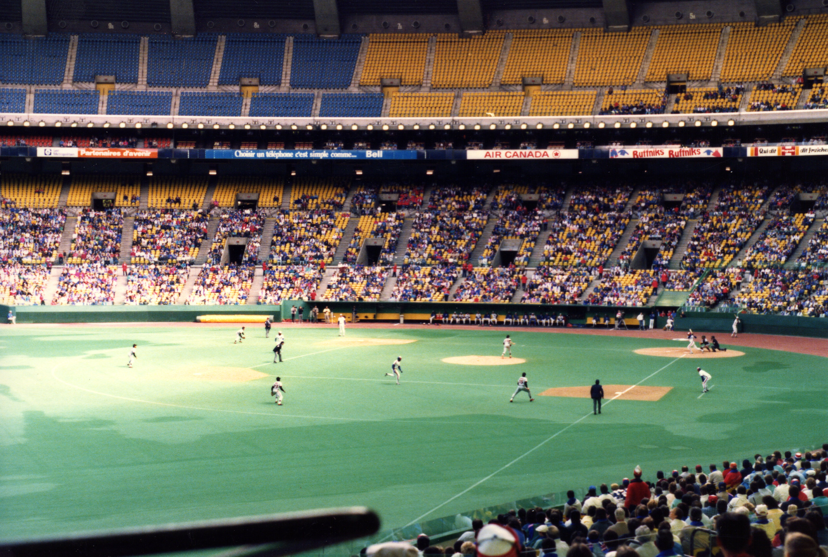 Une partie des Expos de Montréal au Stade olympique durant la saison 1986